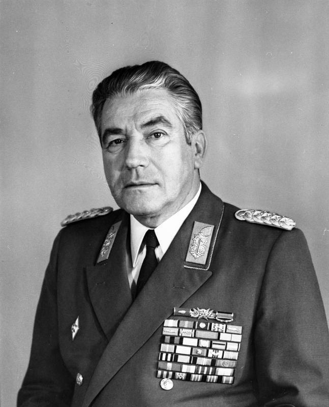 Heinz Hoffmann ADN-ZB/MBD 2.9.1969 Heinz Hoffmann Mitglied des Politbüros des ZK der SED, Minister für Nationale Verteidigung, Armeegeneral [Porträt Heinz Hoffmann] Abgebildete Personen: Hoffmann, Heinz: Minister für Nationale Verteidigung, Mitglied des ZK der SED, DDR (PND 118552503)